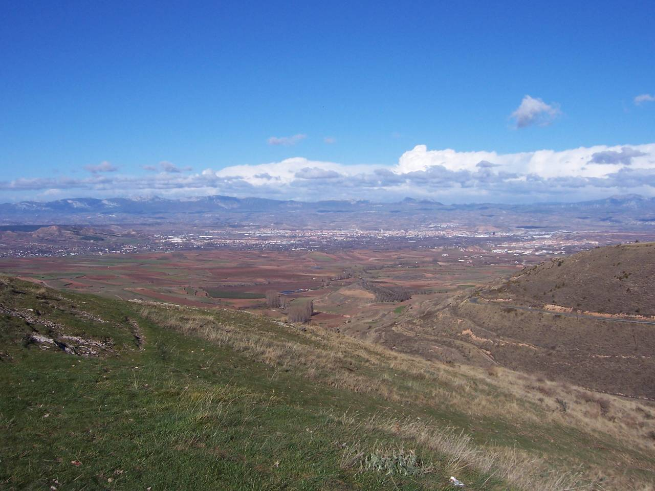 Valle del Iregua visto desde Clavijo